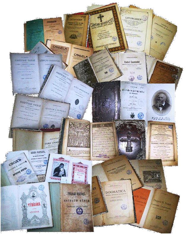 Colecţia de carte rară "Nicorici Ioan"